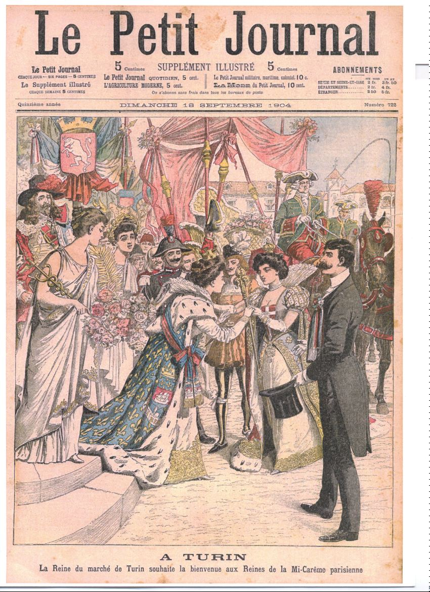 La Reine du Marché de Porta Palazzo accueille à Turin les Reines de la Mi-Carême parisienne.